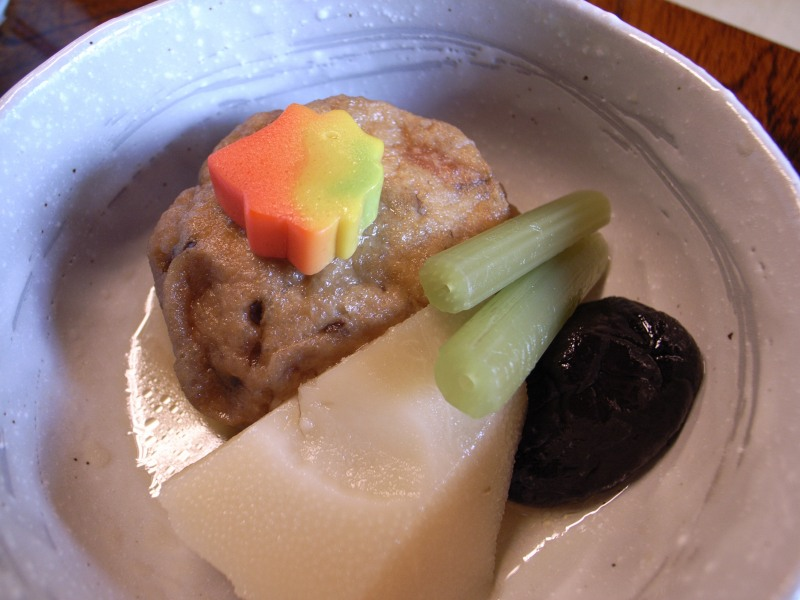 がんもどきの煮付け